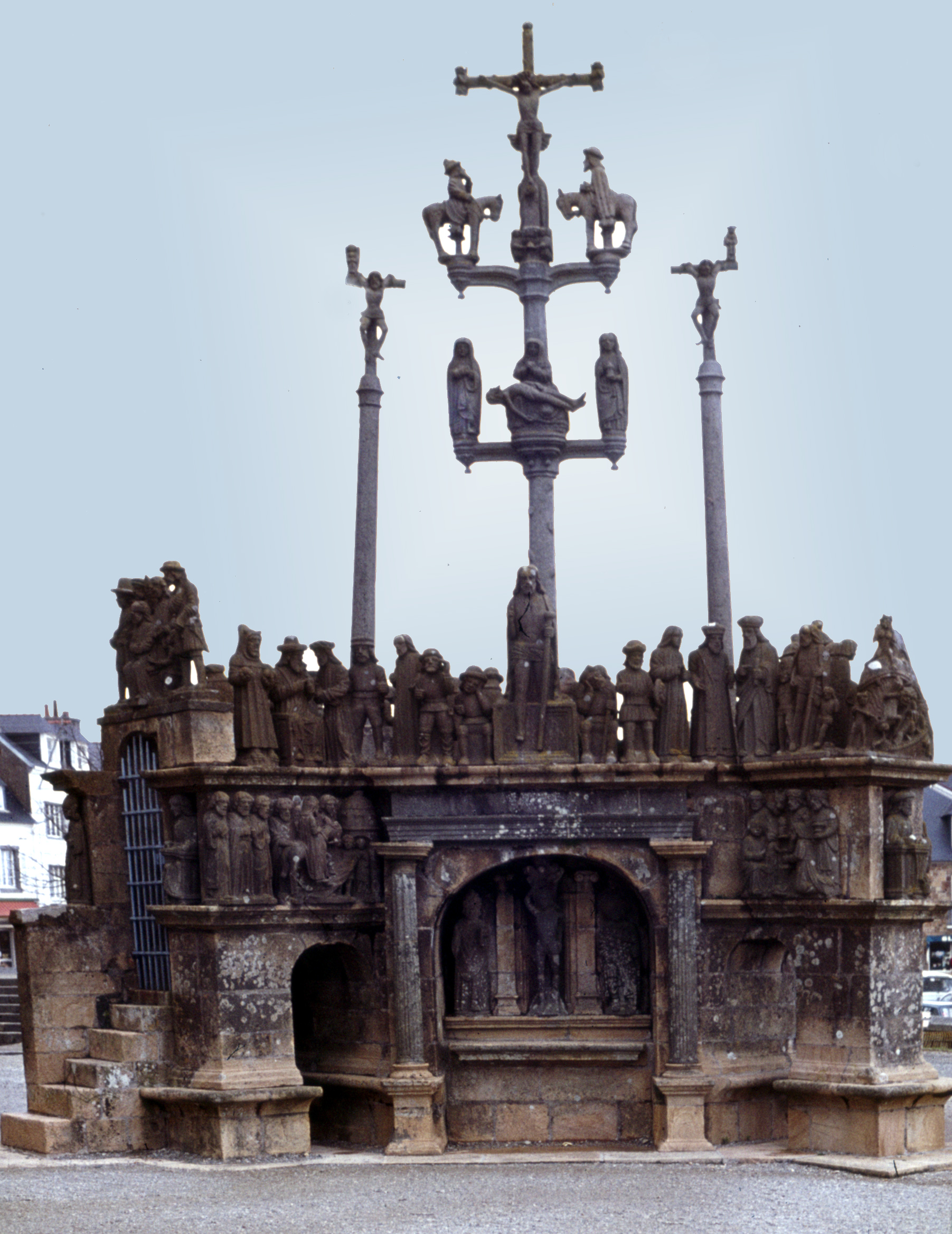 Calvaire de Plougastel-Daoulas